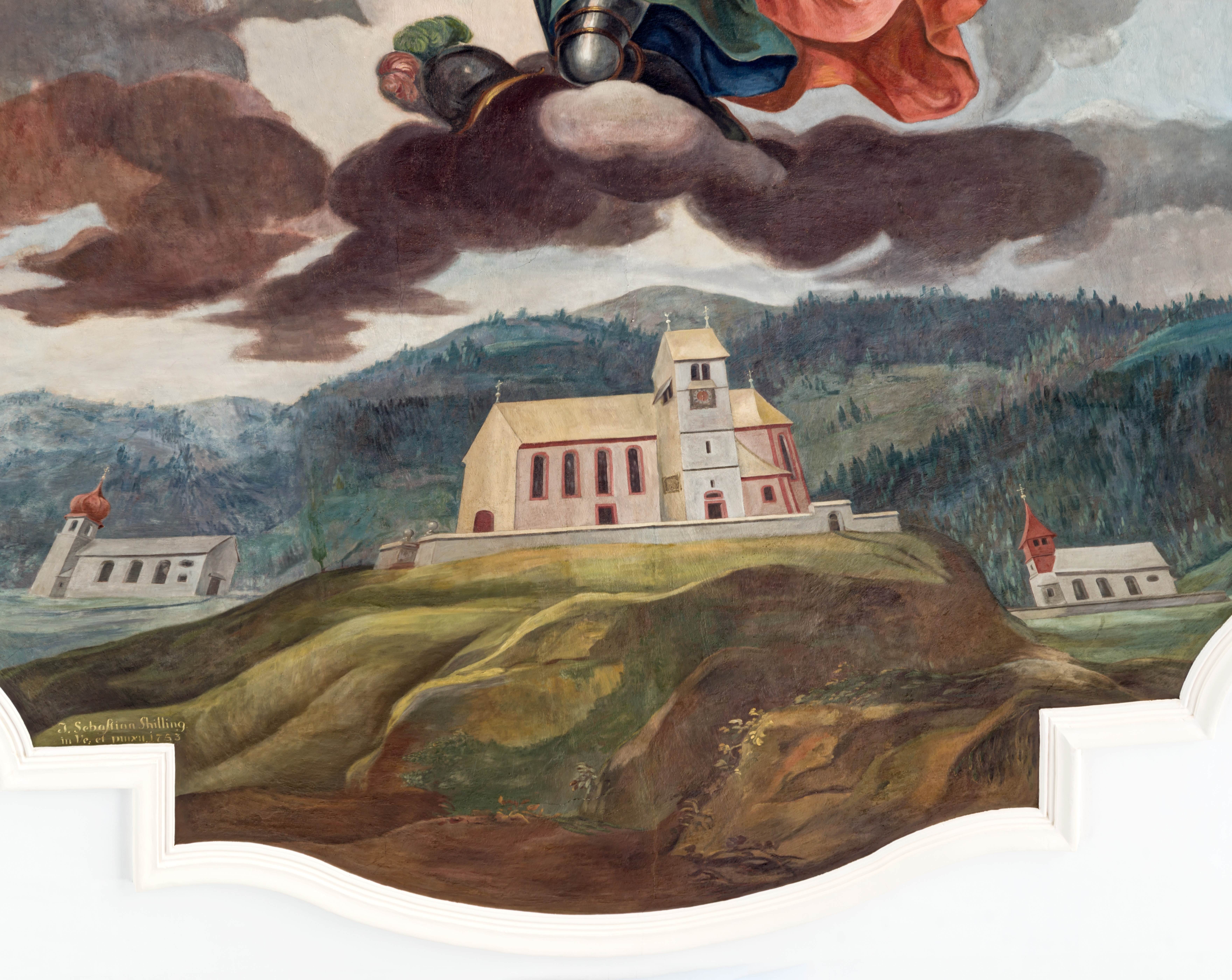 Bilder aus Oberried Ausschnitt aus dem Deckengemälde mit drei Kirchen Breitnau, Hinterzarten und im Höllental